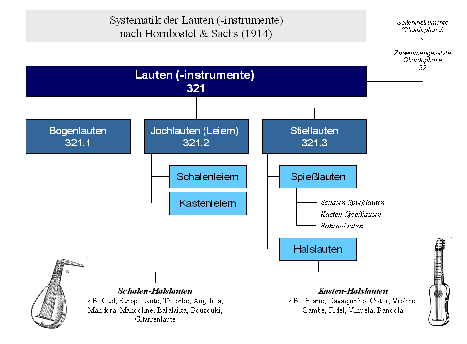 Systematik der Lauteninstrumente nach Hornbostel & Sachs [text on image] Systematik der Lauten (-instrumente) nach Hornbostel & Sachs (1914) 3 Saiteninstrumente (Chordophone) | 32 Zusammengesetzte Chordophone | 321 Lauten (-instrumente) +------+-----------------+----------------------+ | | | 321.1 Bogenlauten 321.2 Jochlauten (Leiern) 321.3 Stiellauten | | +- Schalenleiren +- Spießlauten | | | +- Kastenleiern | +- Schalen-Spießlauten | +- Kasten-Spießlauten | +- Röhrenlauten | +- Halslauten +------------------------------+-+ | | Schalen-Halslanten Kasten-Halslanten z.B. Oud, Europ. Laute, Theorbe, Angelica, z.B. Gitarre, Cavequinho, Cister, Violine, Mandora, Mandoline, Balalaika, Bouzouki, Gambe, Fidel, Vihuela, Bandola Gitarrenlaute